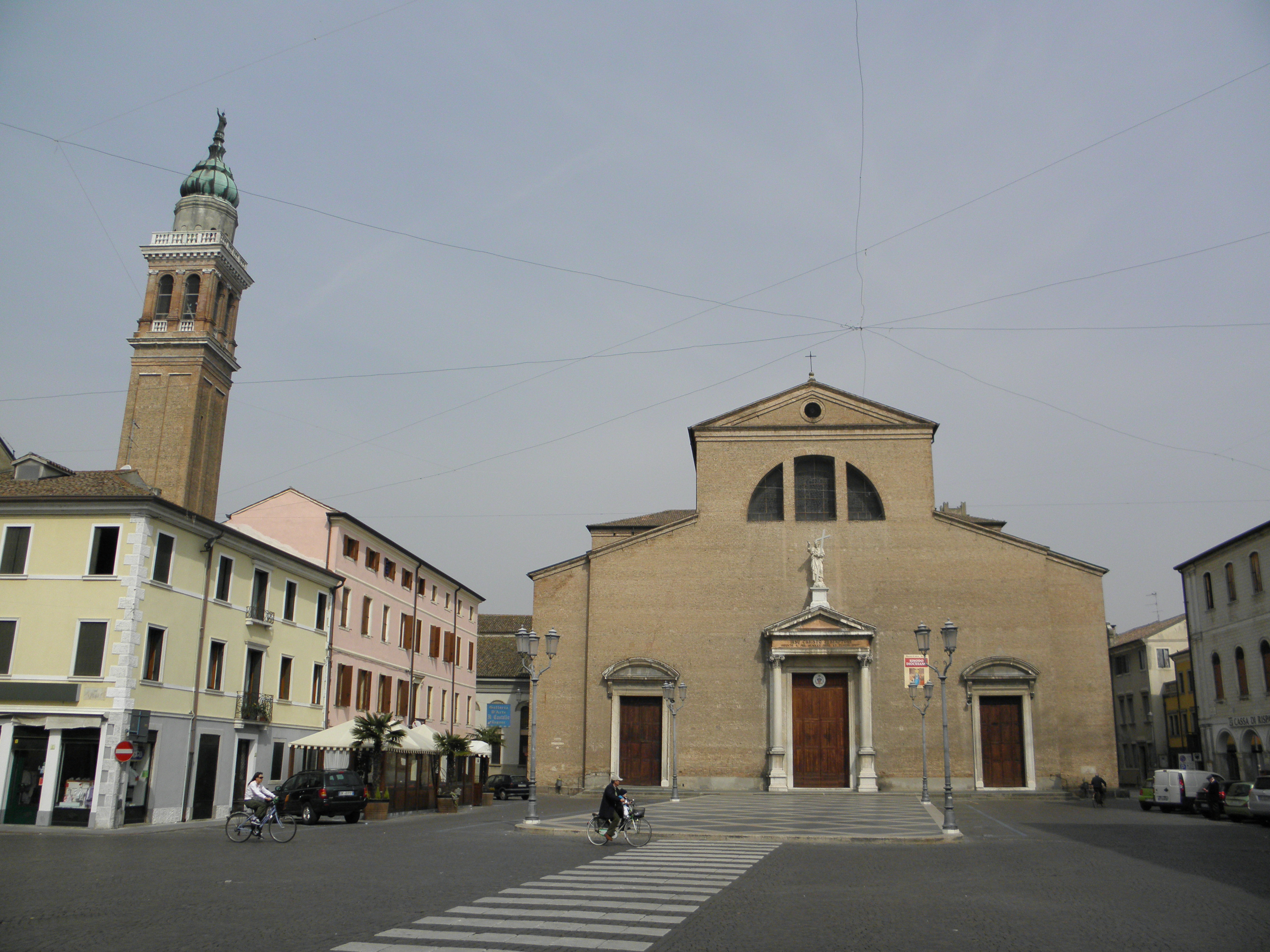 Adria: il Duomo, Cattedrale dedicata ai Santi Pietro e Paolo, consacrata nel XIX secolo.